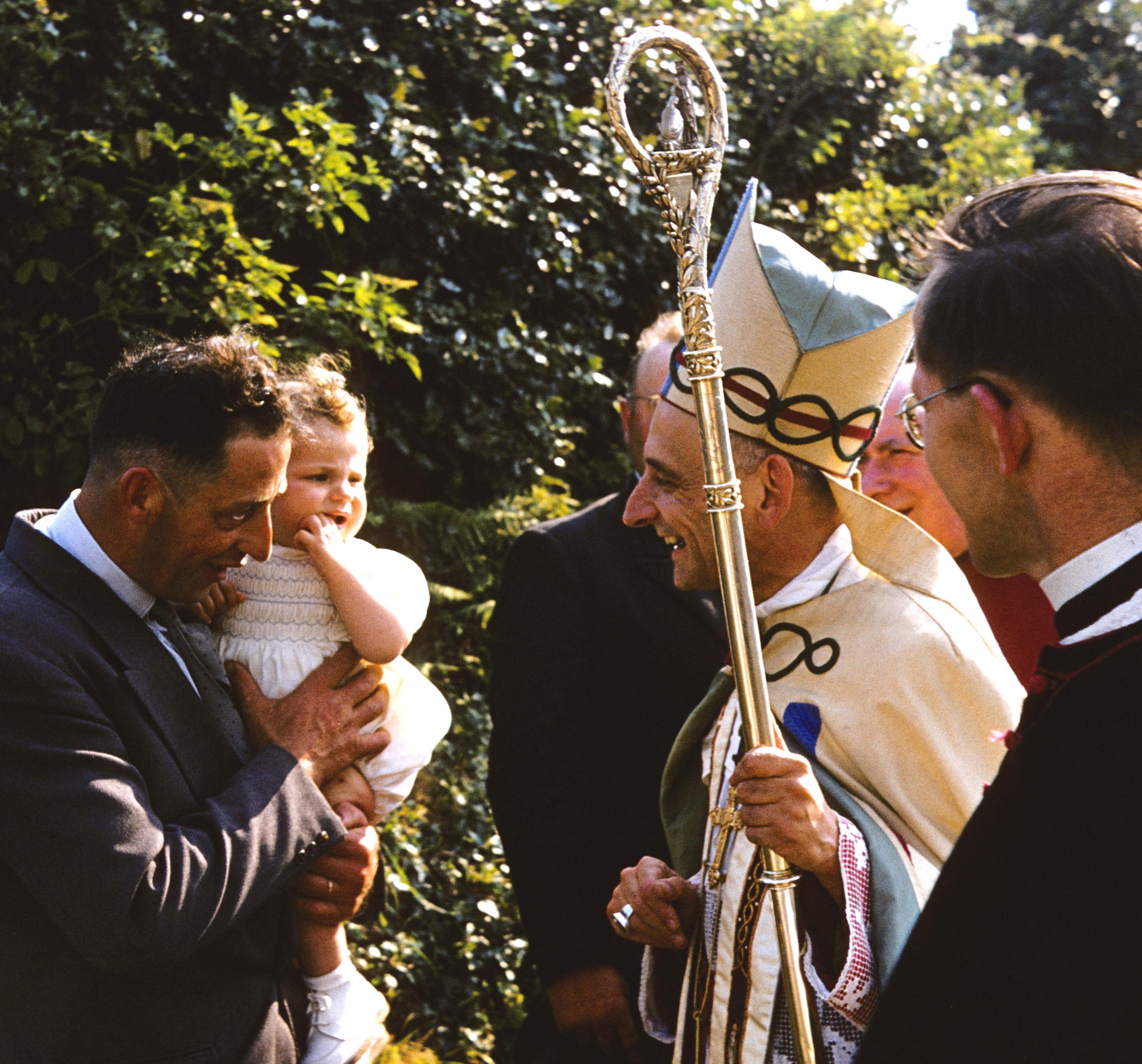 Photographie du Cardinal Guyot prise le 19 juin 1957 alors qu'il était évêque de Coutances et Avranches (1949-1966) et confirmait les enfants du canton des Pieux à Pierreville (Manche).